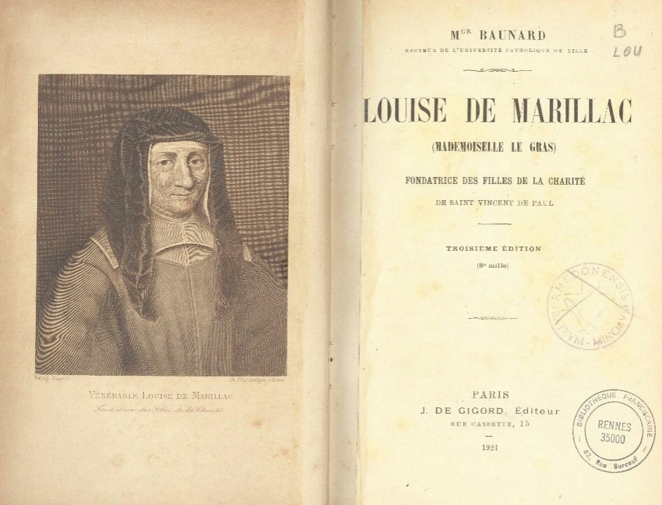 Mgr Louis Baunard, Louise de Marillac, fondatrice des filles de la Charité, Paris, J. de Gigord, 3e édition, 1921.